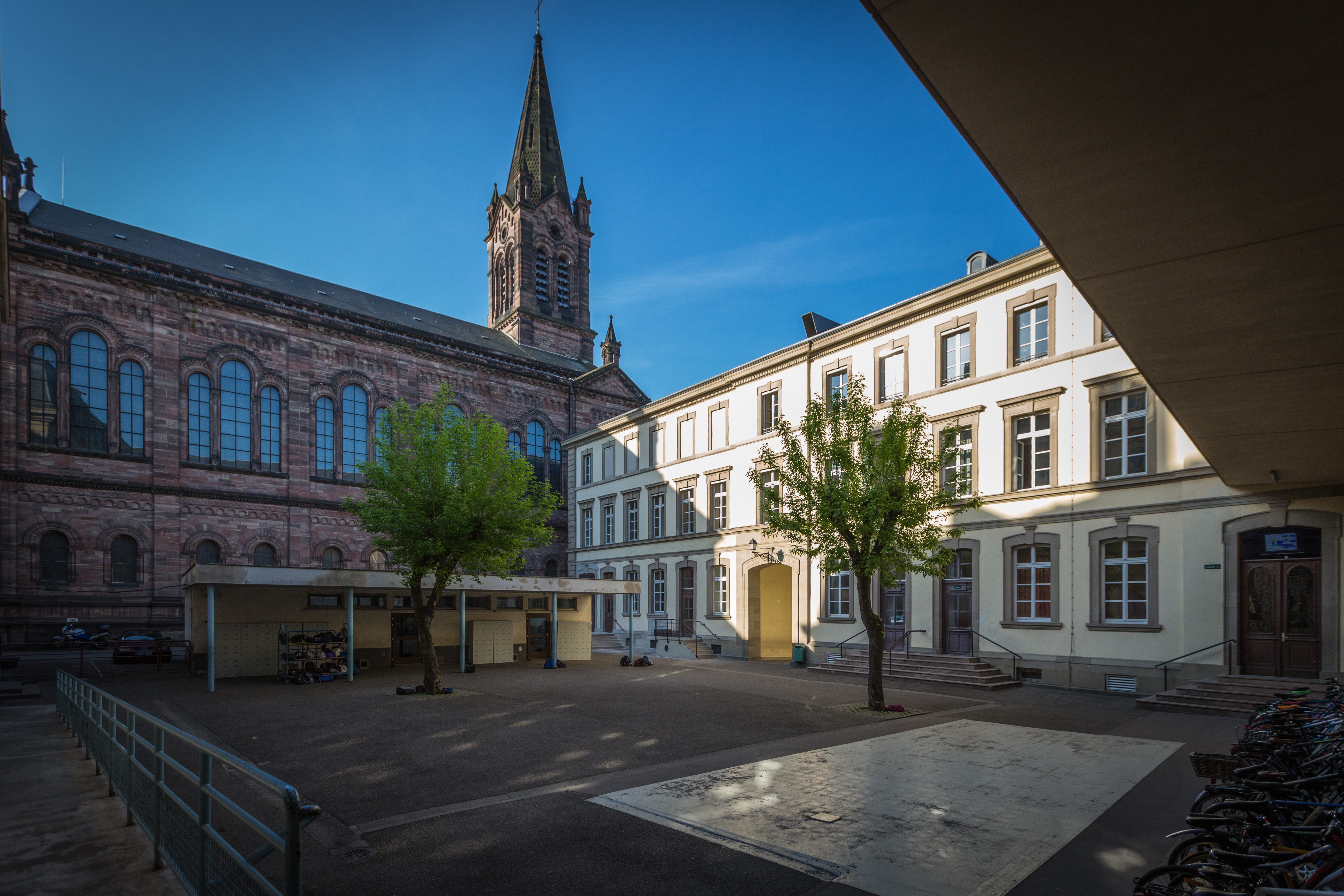 Strasbourg Gymnase Jean-Sturm avril 2014